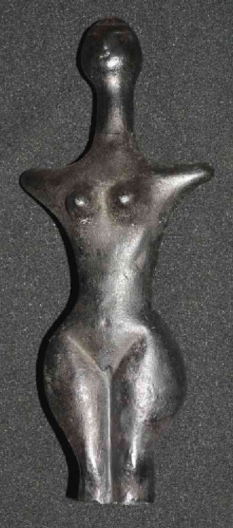 Il s'agit d'une copie moulage fidèle à l’original de valeur 185 €uros.